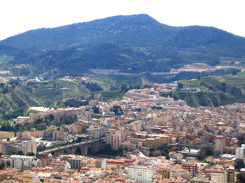 Vista aèria d'Alcoi, des de la Mariola